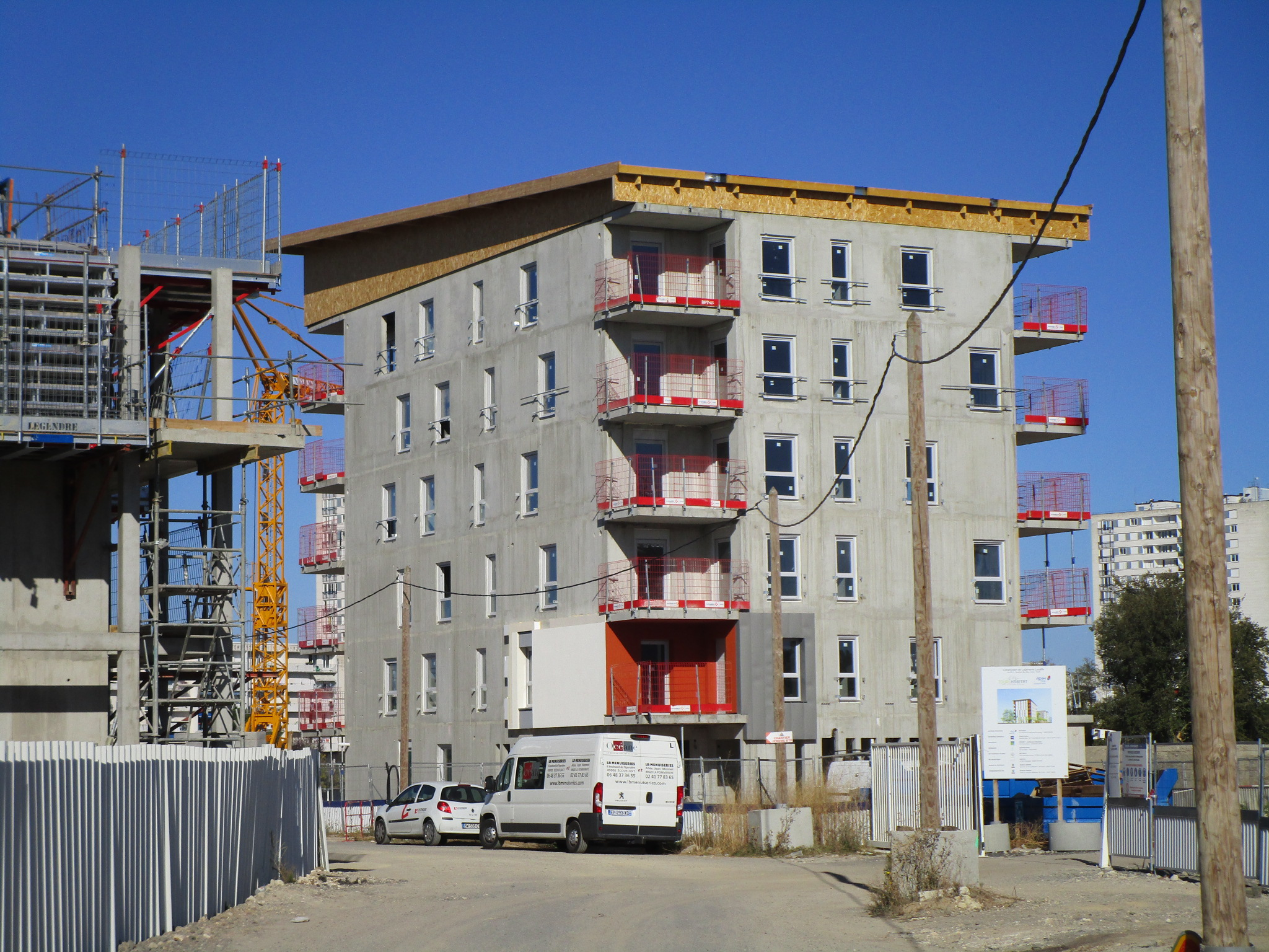 Immeuble de logements sociaux de 22 appartements en construction dans le quartier des Deux-Lions, à Tours